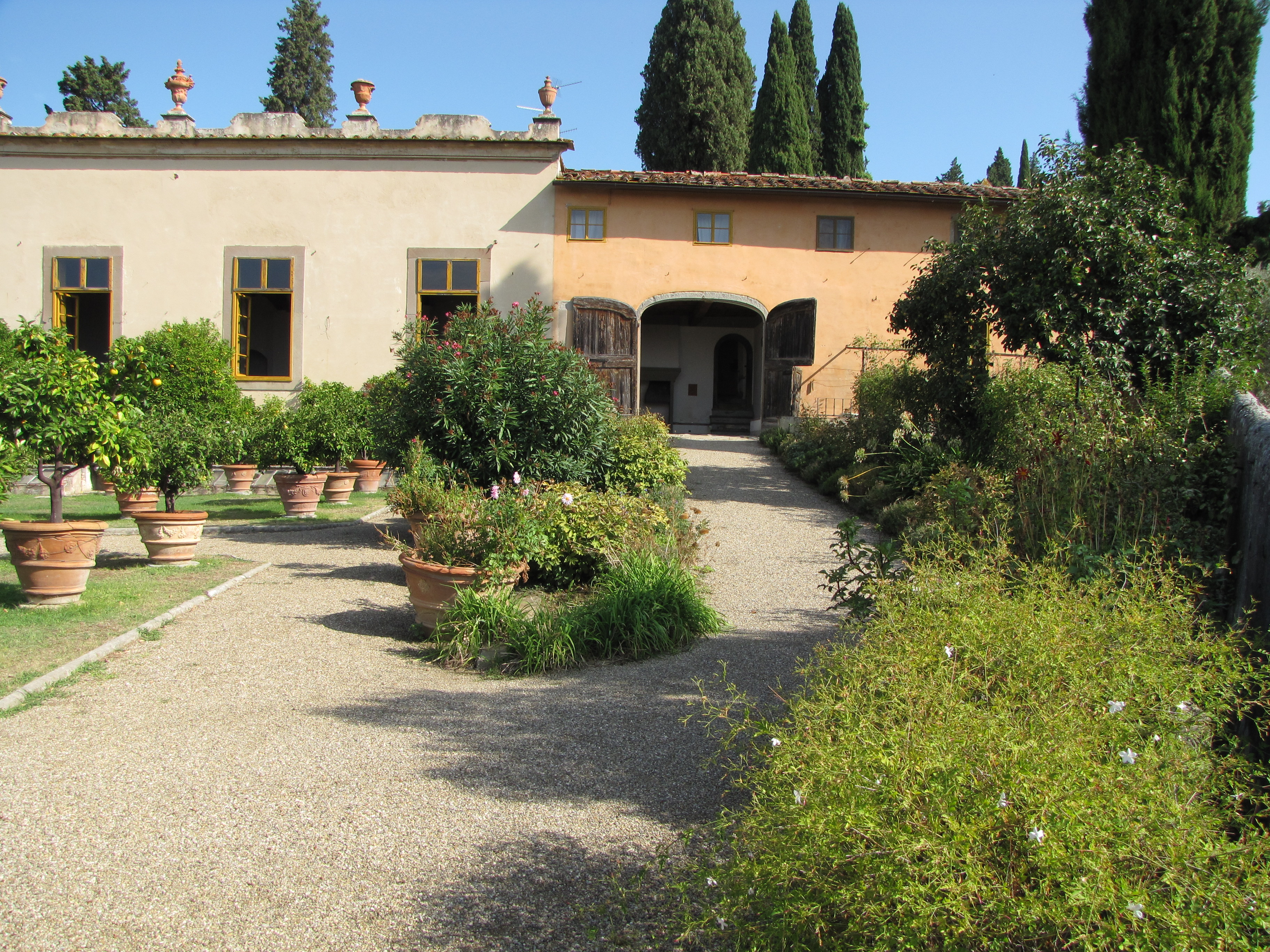 Villa Gamberaia Settignano La limonaia